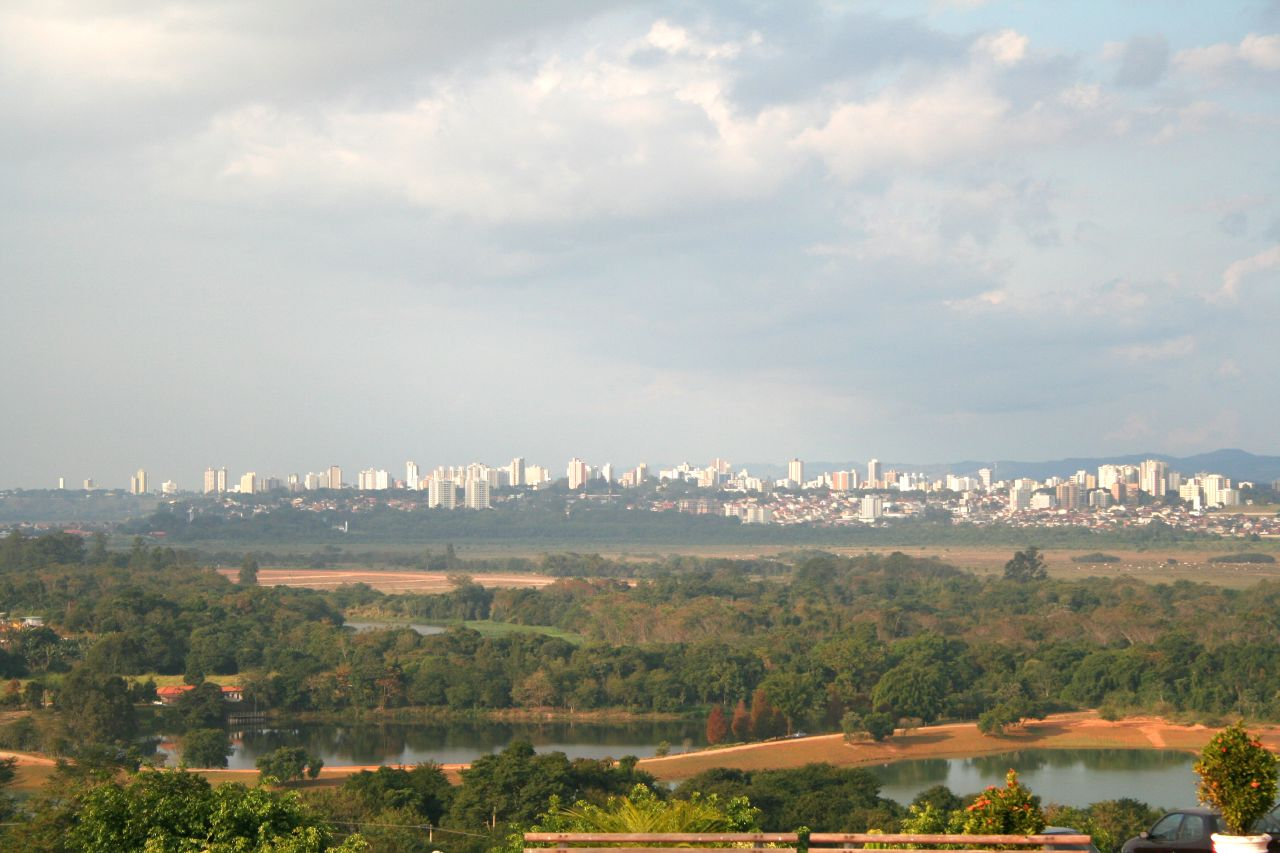 Uma vista de longe da cidade pra começar a série sobre São José dos Campos